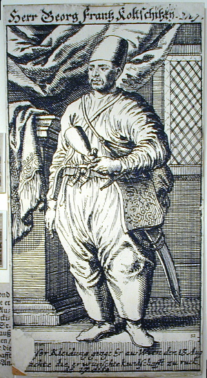 Der kaiserliche Kundschafter Georg Franz Kolschitzky (1640-1694) zur Zeit der 2. türkischen Belagerung der Stadt Wien